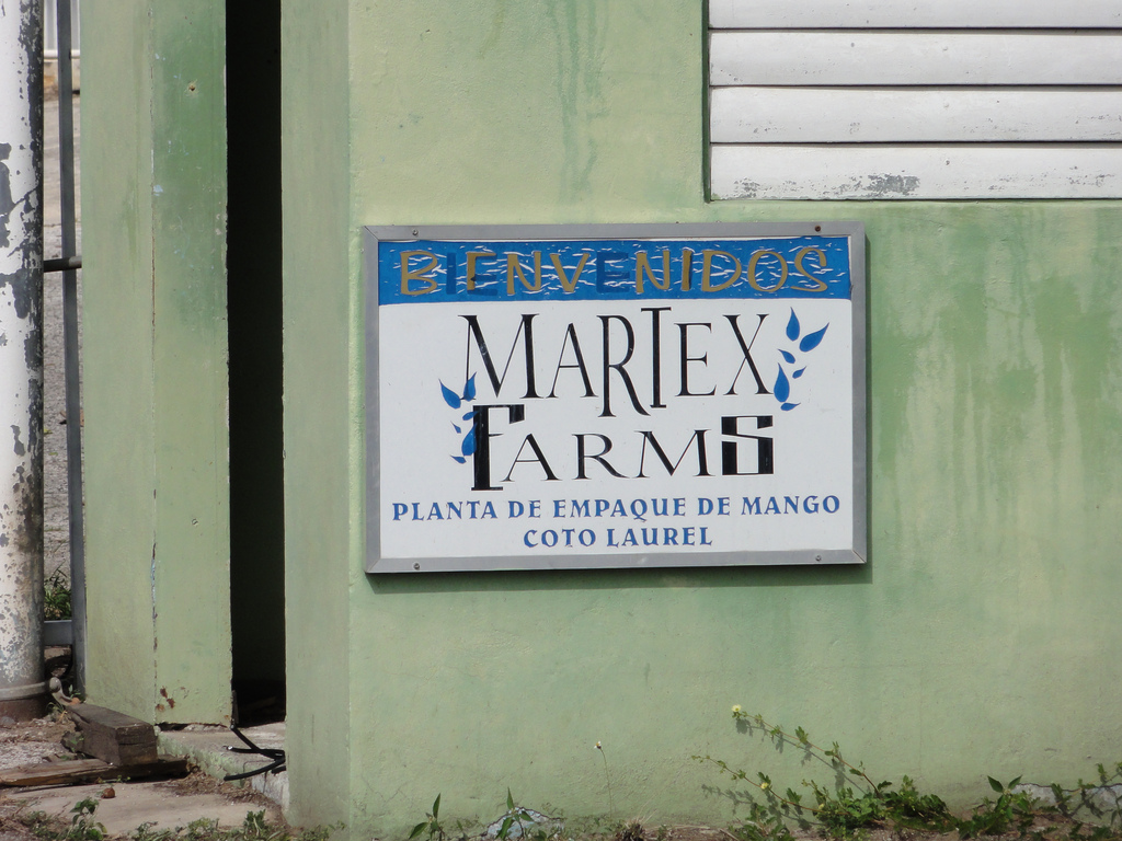 Letrero a la entrada de la Planta Empacadadora de Mangos, Martex Farms (Enero 2012 - temporada baja), Barrio Coto Laurel, Ponce, Puerto Rico Letrero a la entrada de la Planta Empacadadora de Mangos, Martex Farms (Enero 2012 - temporada baja), Barrio Coto Laurel, Ponce, Puerto Rico Letrero a la entrada de la Planta Empacadadora de Mangos, Martex Farms (Enero 2012 - temporada baja), Barrio Coto Laurel, Ponce, Puerto Rico